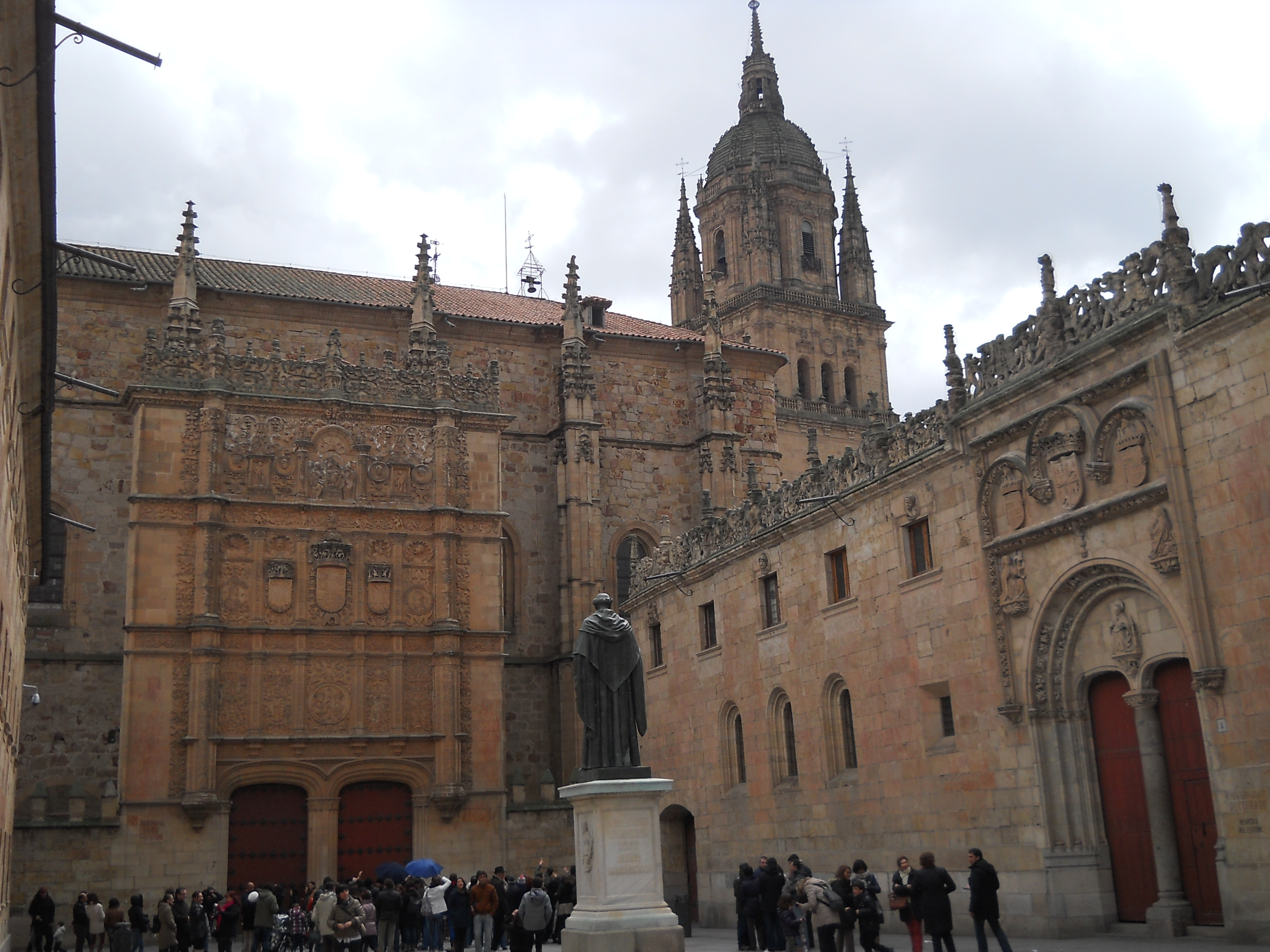 Patio de Escuelas, Universidad de Salamanca, España